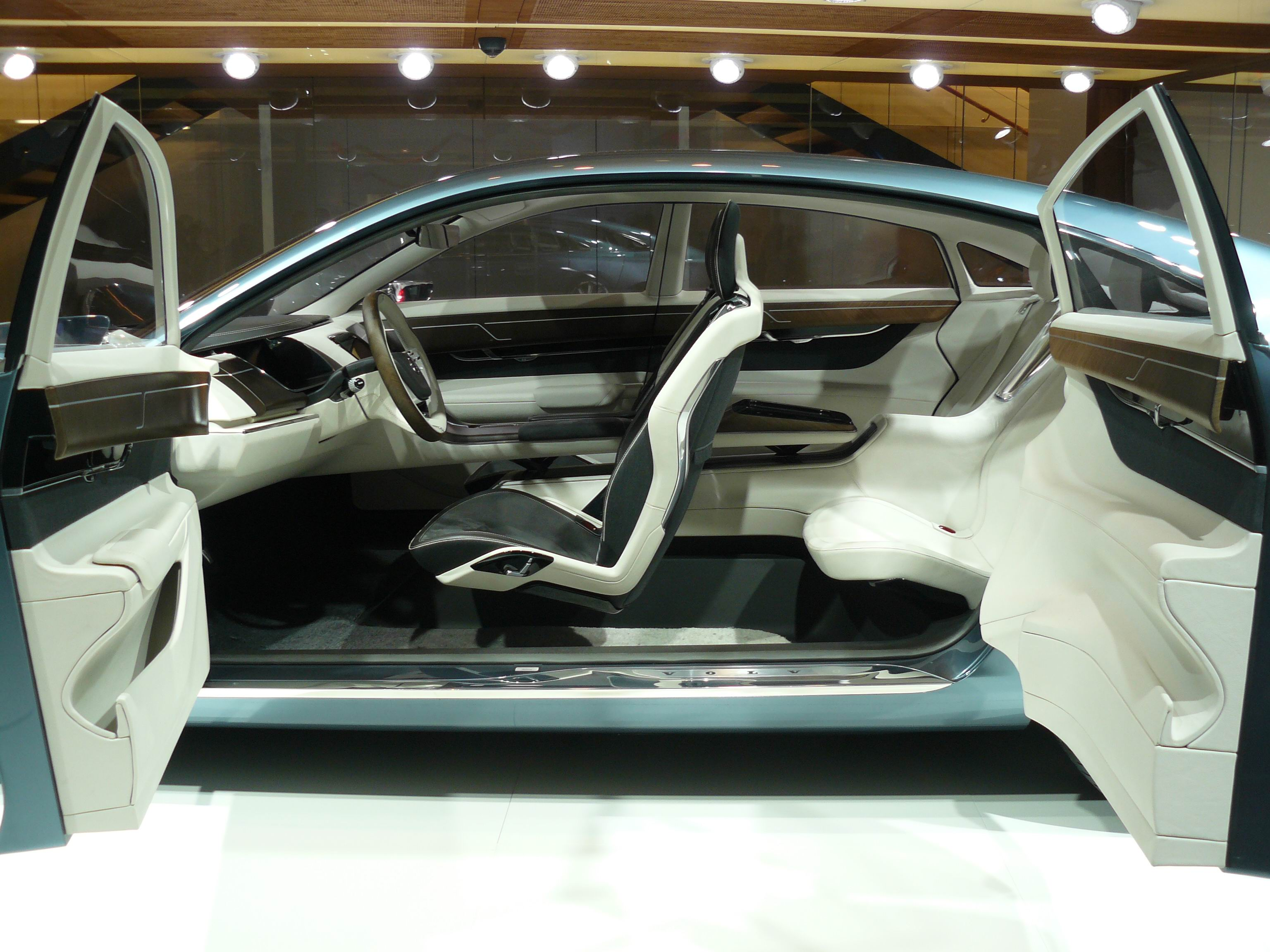 Volvo You, Francfort 2011.